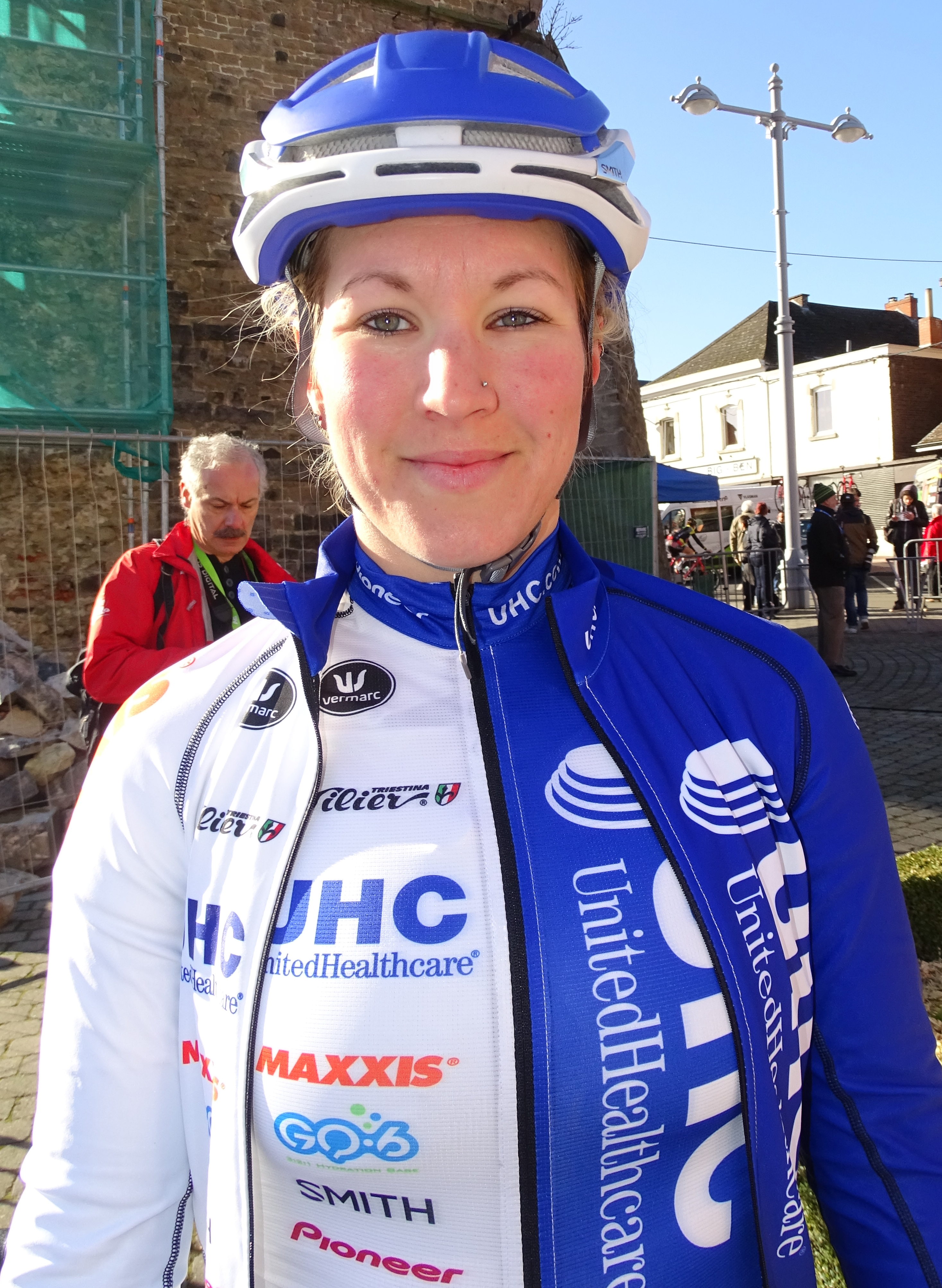 Reportage réalisé le mercredi 2 mars à l'occasion du départ du Samyn des Dames 2016 et du Samyn 2016 à Quaregnon, Belgique.